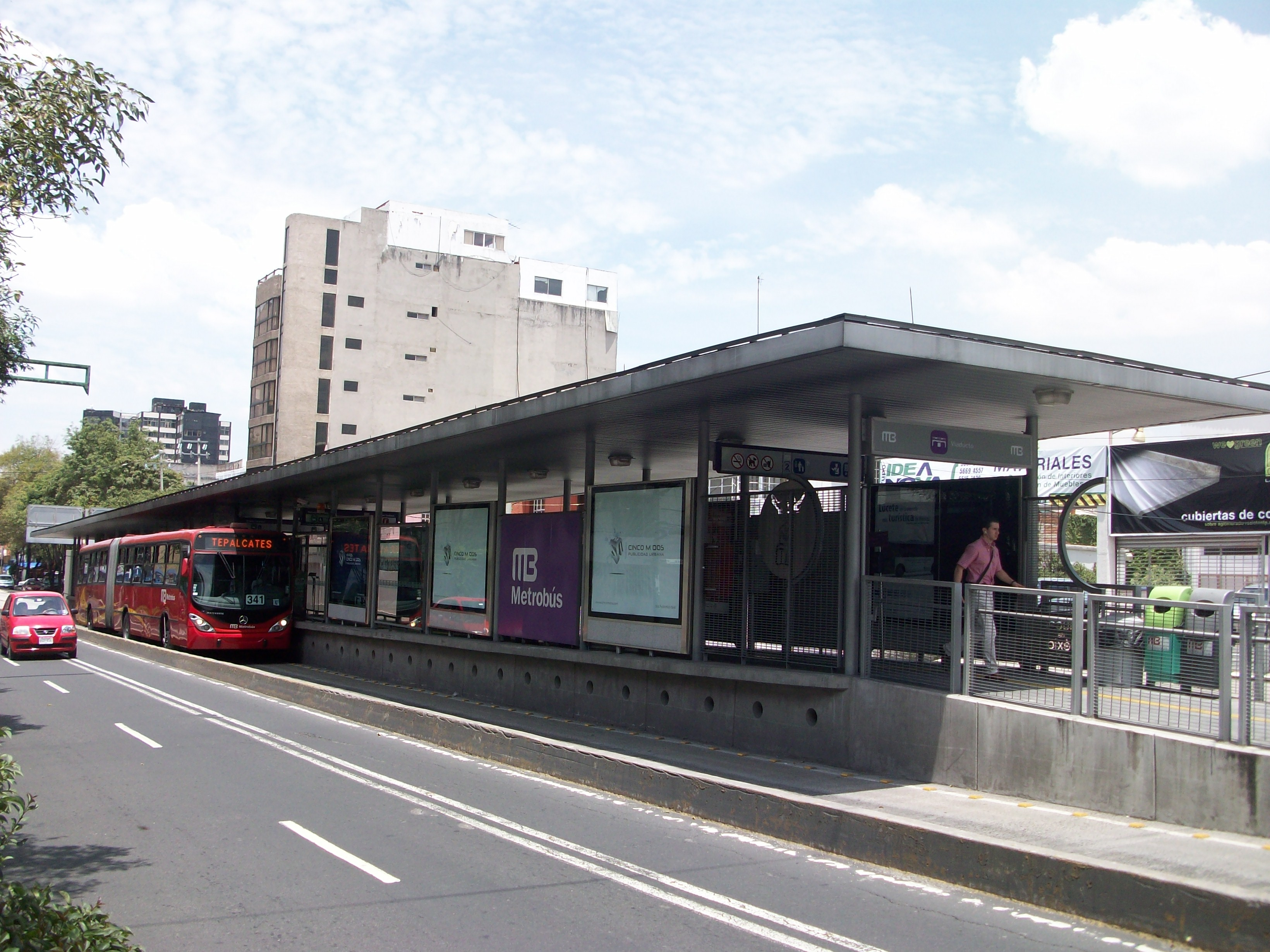 Estacion Viaducto